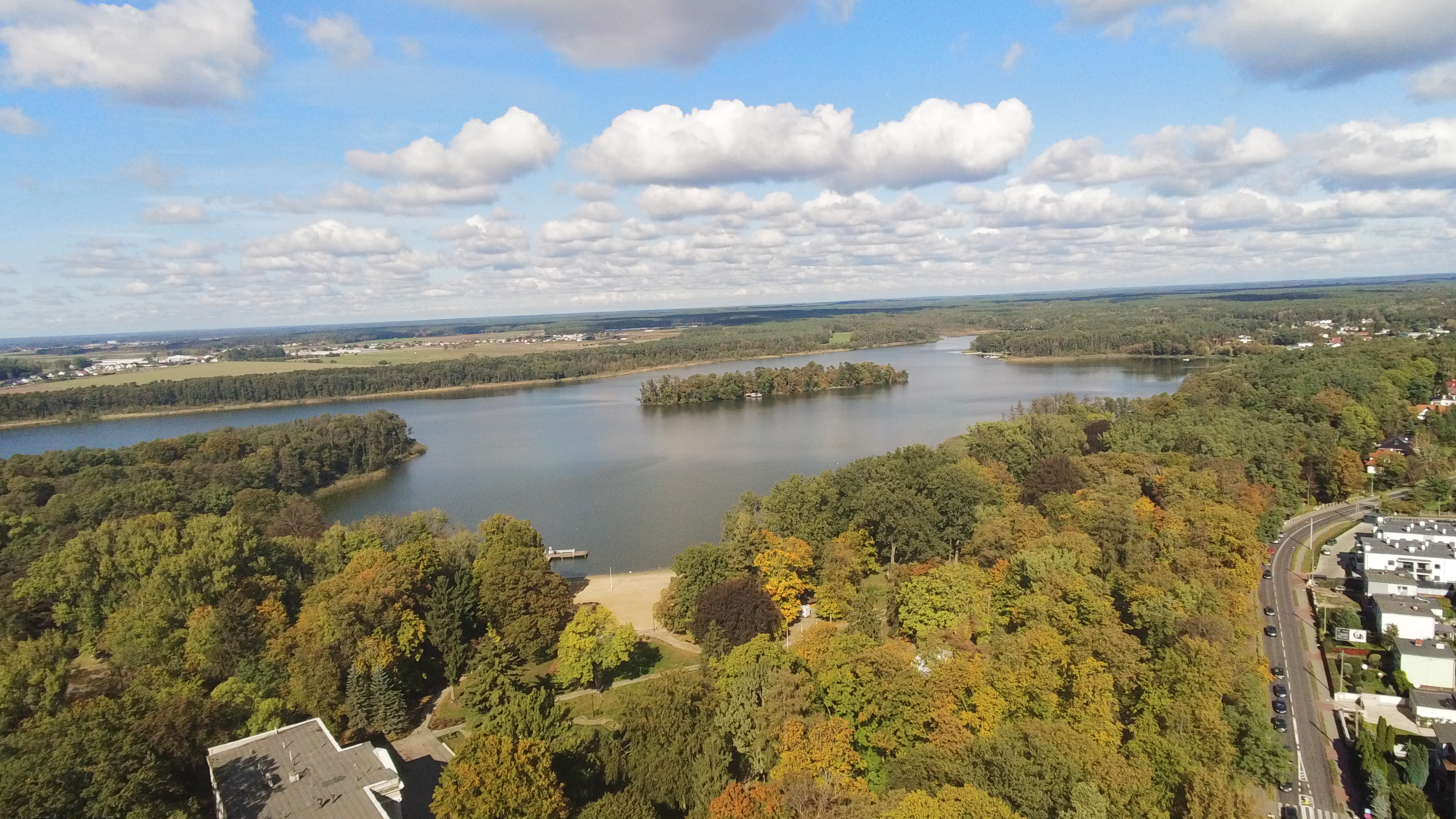 Jezioro Wolsztyńskie zdjęcie z lotu ptaka